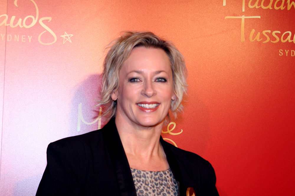 Amanda Keller